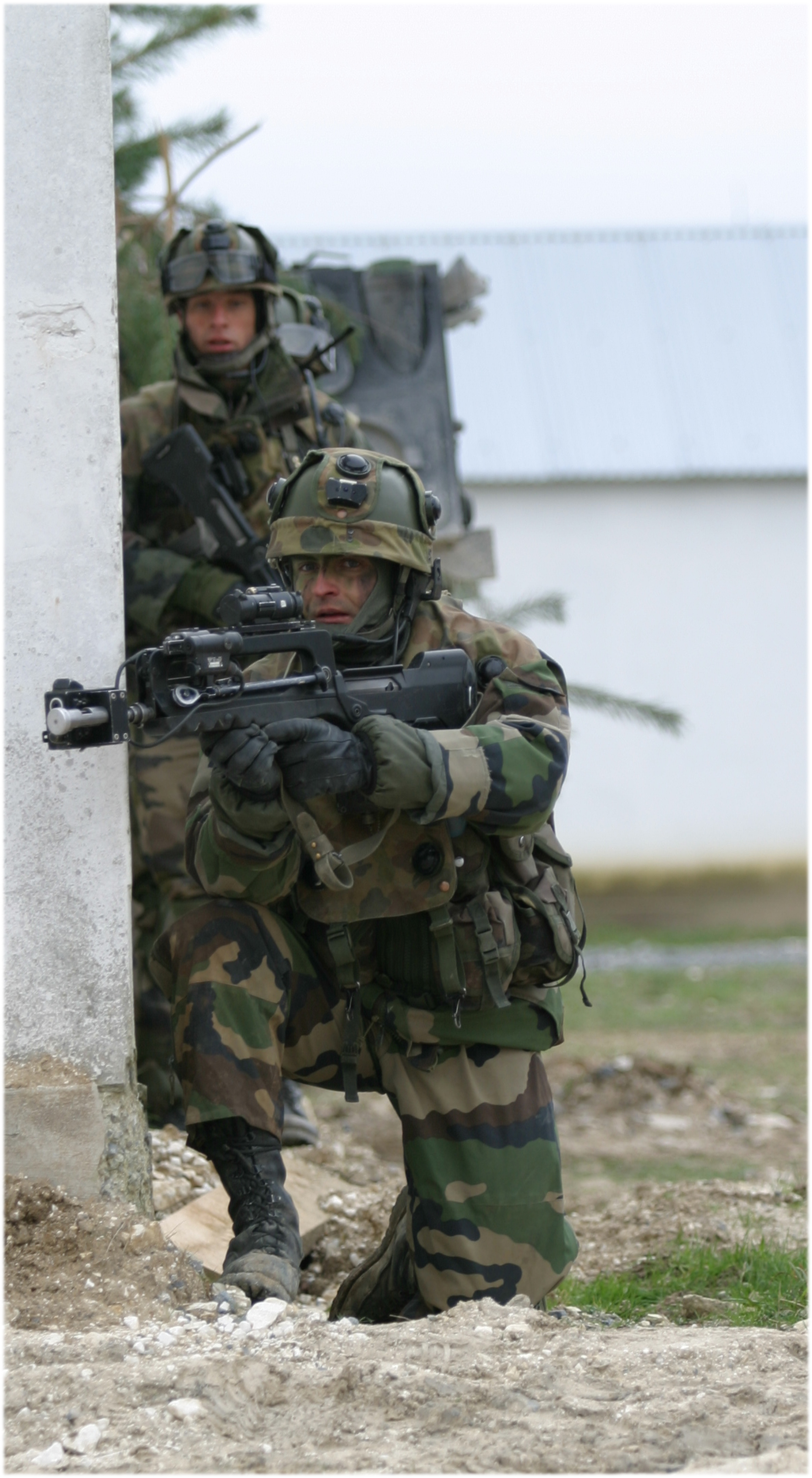 fantassins du 2e REI (Légion étrangère) au CENZUB en 2007